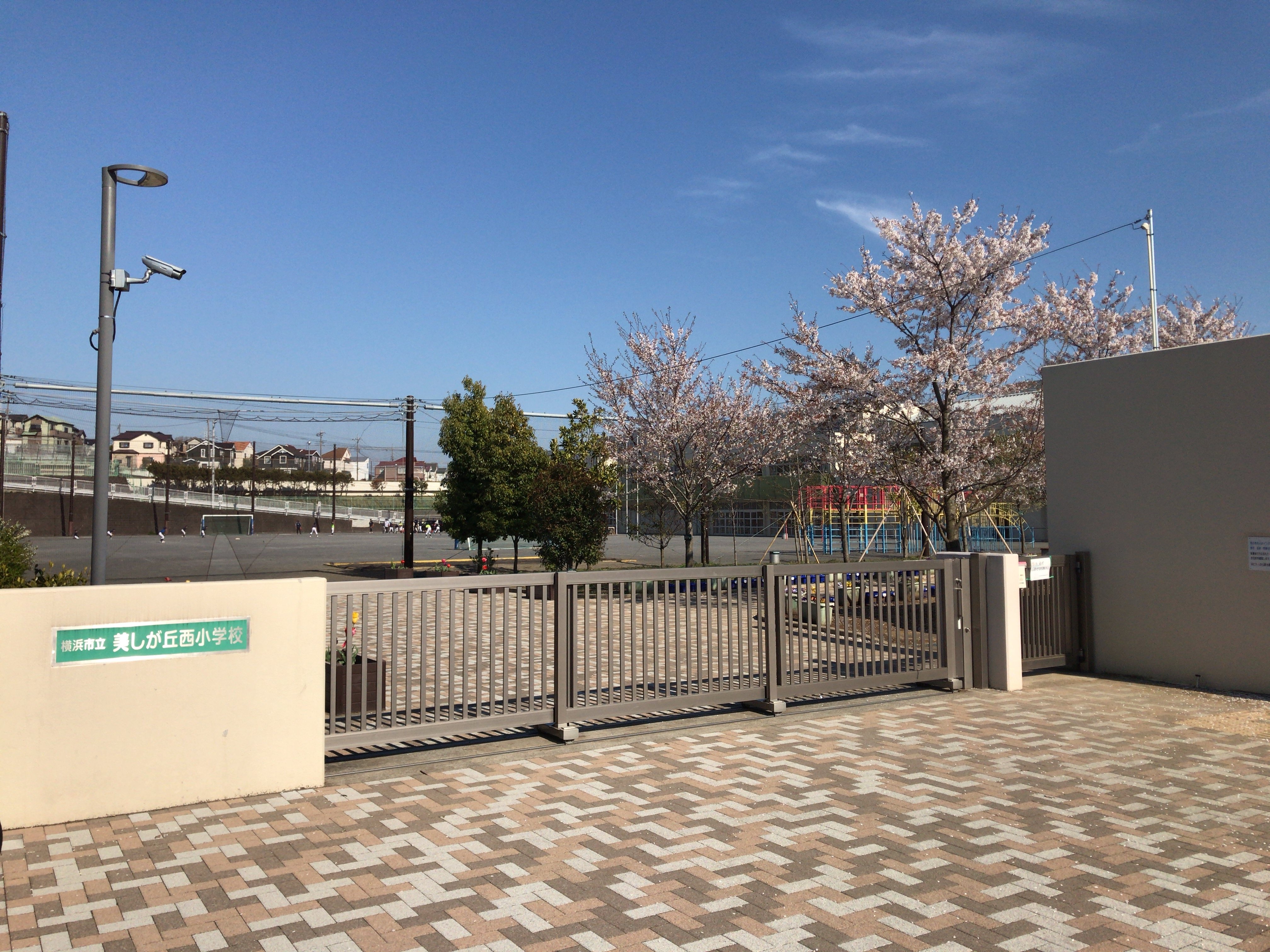 美しが丘西小学校正門より、校舎、校庭を臨む。2019年4月13日撮影。